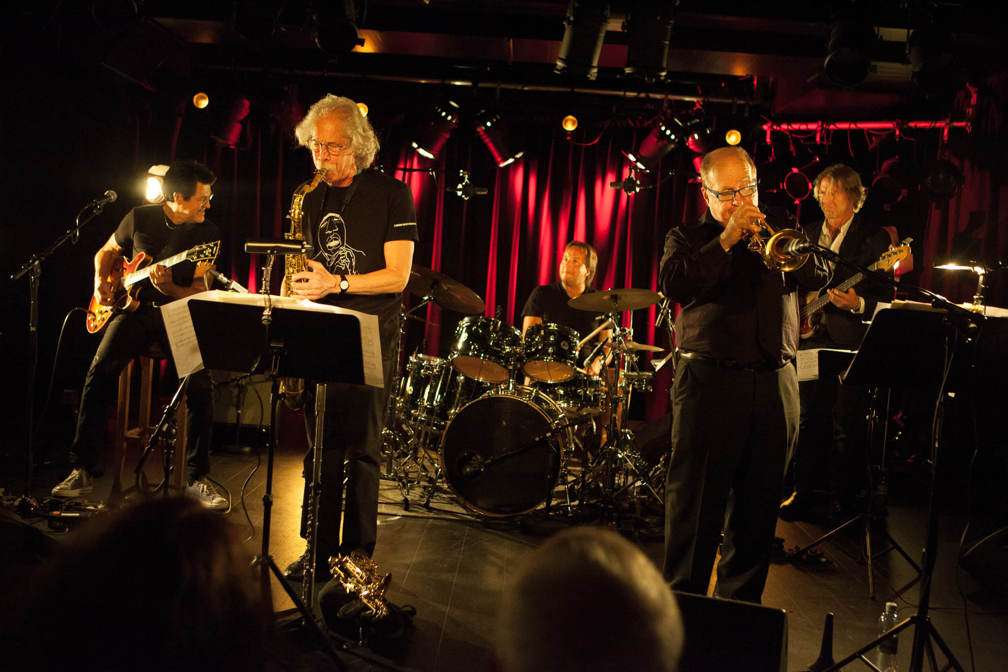 Bandet The New York Connection opptrer på Sinus i Bodø under Nordland musikkfestuke 2013